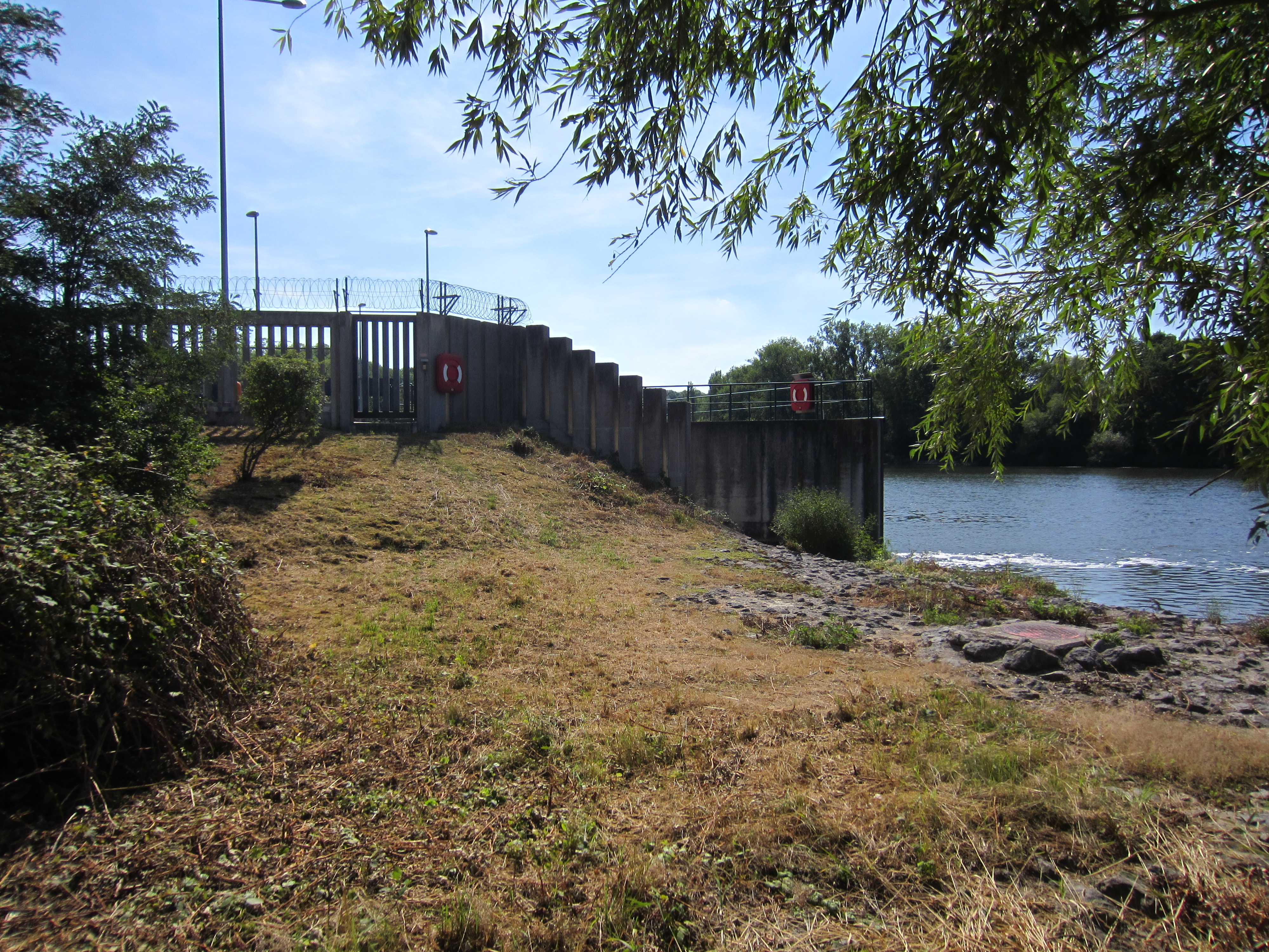 Kernkraftwerk Neckarwestheim